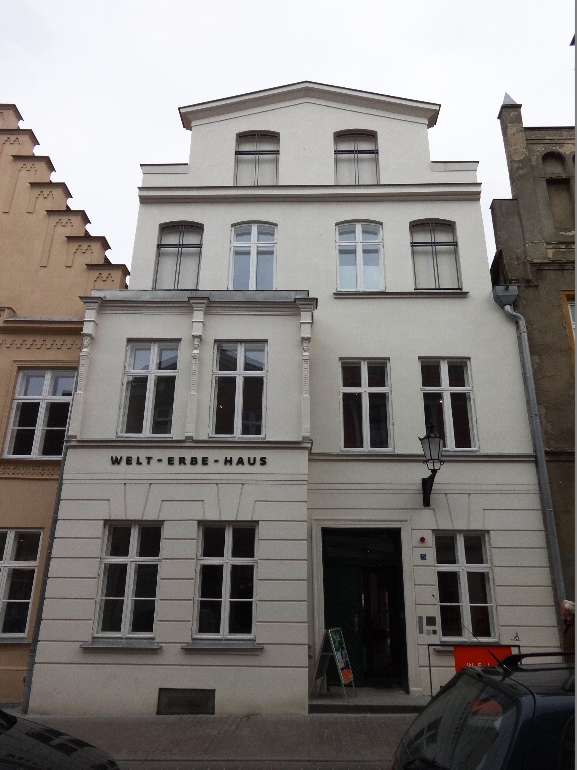 Das Welt-Erbe-Haus ist ein denkmalgeschütztes Dielenhaus aus dem 14. Jahrhundert in Wismar. Seit Juni 2014 befindet sich dort eine Ausstellung zum Weltkulturerbe der UNESCO.